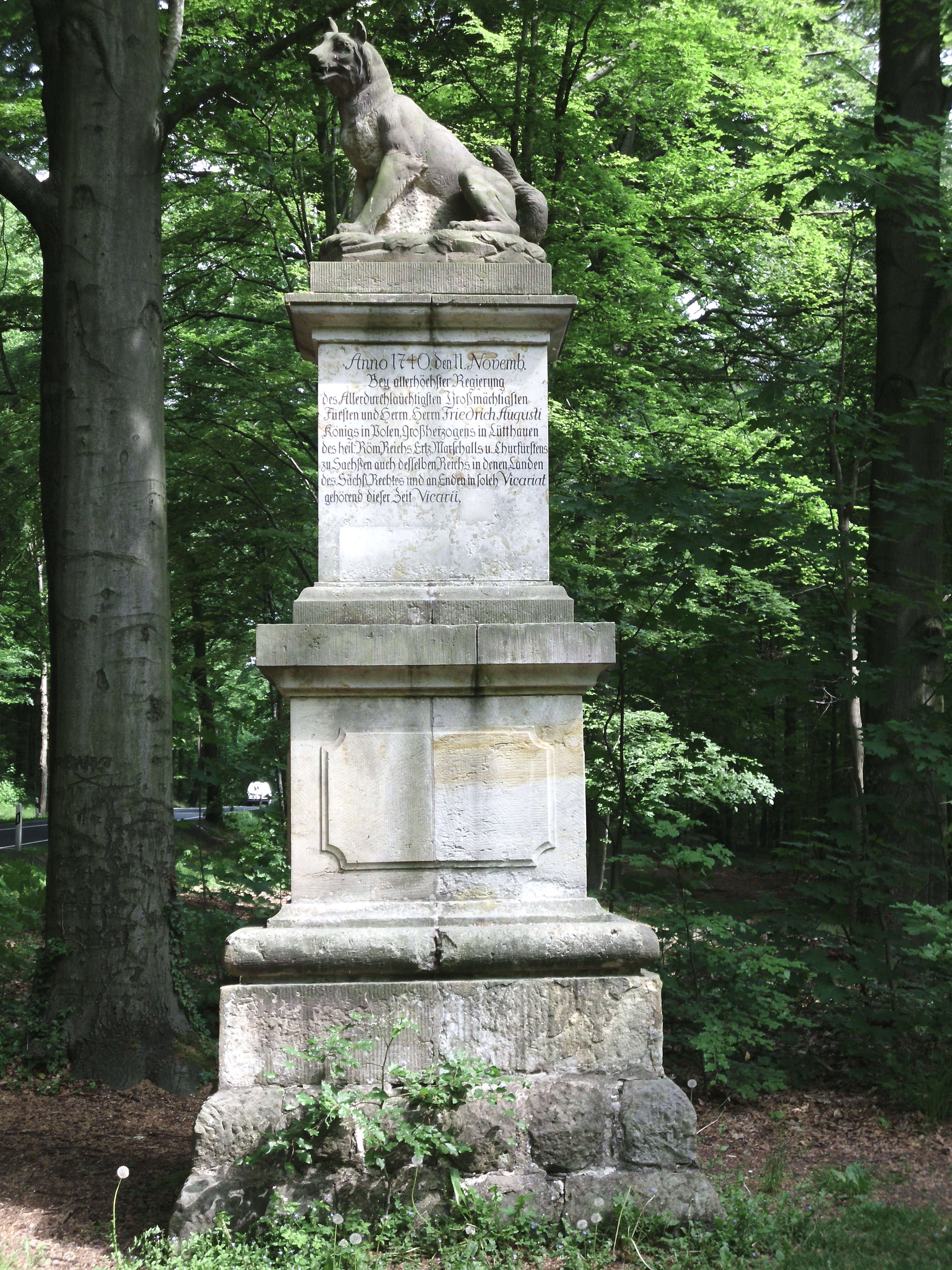 Wolfsmonument an der Straße zwischen Laußnitz und Ottendorf-Okrilla. Sandstein, 5 m hoch. Anno 1740, den 11. Novemb // Bey allerhöchster Regierung / des Allerdurchlauchtigsten Großmächtigsten / Fürsten und Herrn Herrn Friedrich Augusti / Königs in Polen, Großherzogens in Lütthauen des heil. RömReichs ErtzMarschalls u. Churfürstens zu Sachßen auch desselben Reichs in denen Landen des SächßRechtes und an Enden in solch Vicariat gehörend dieser Zeit Vicarii